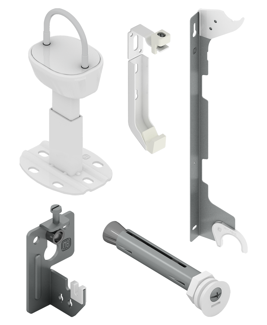 Fissaggi per calorifero o radiatori rispettivamente, partendo da sinistra in alto: a pavimento, a parete e per cappotto termico